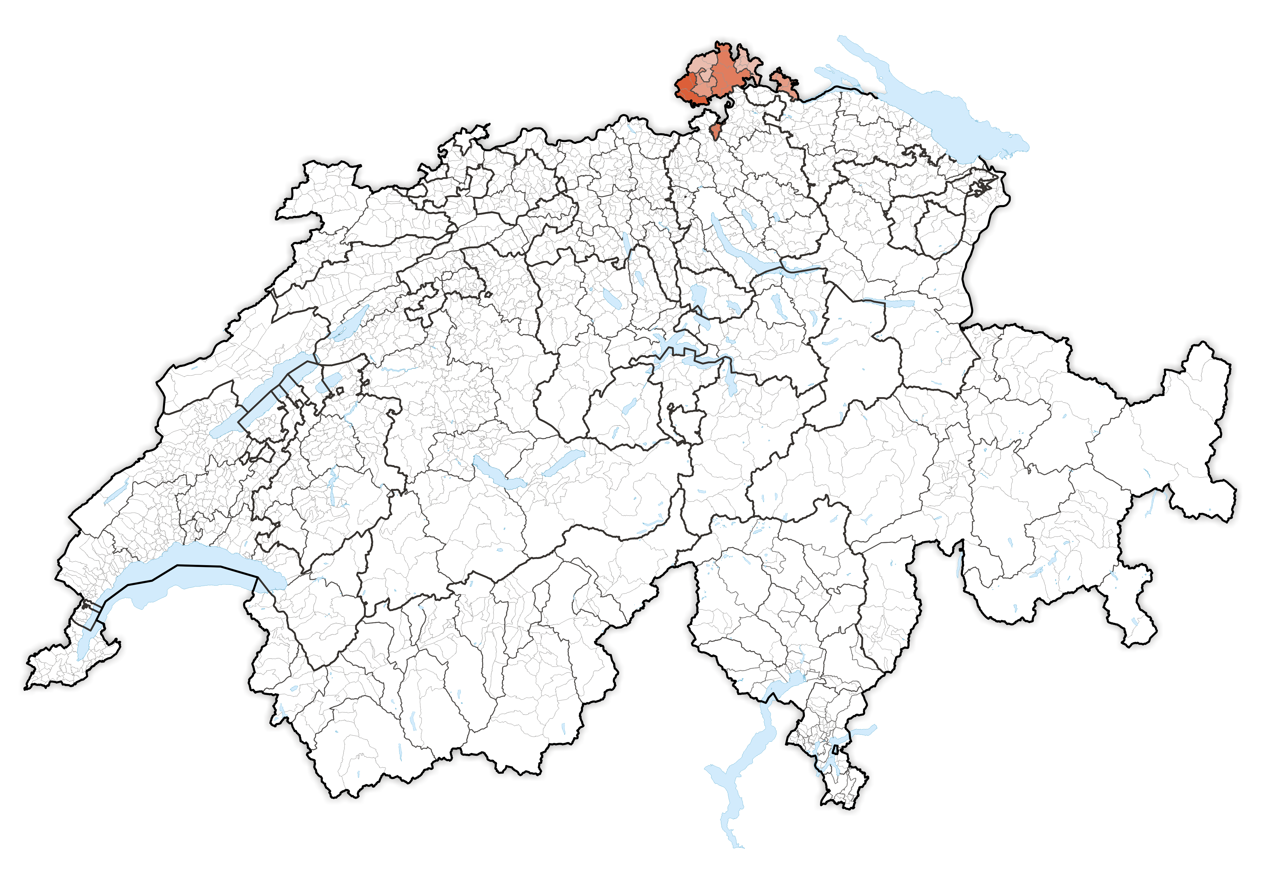 Canton Schaffhausen